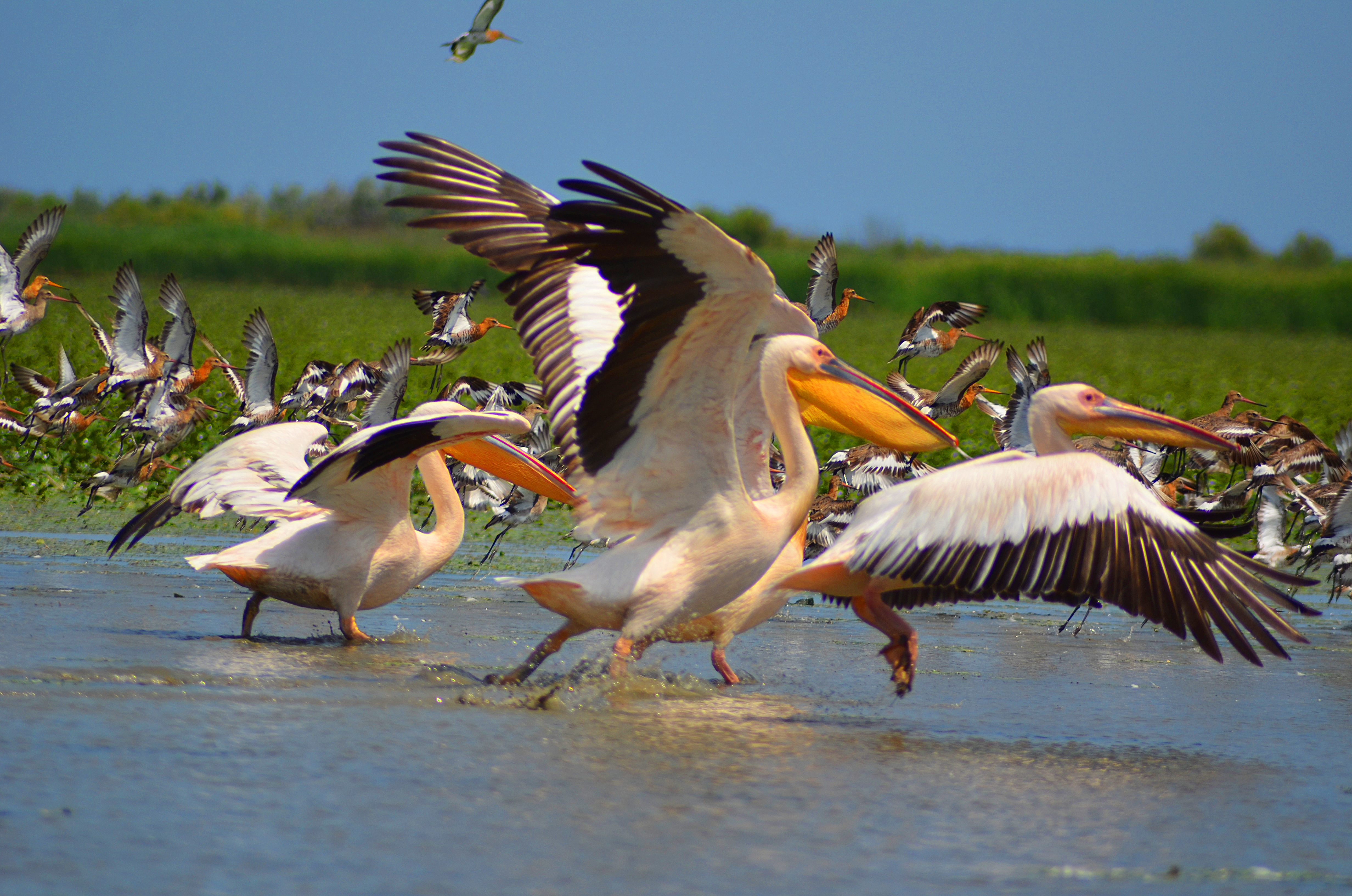 Дунайський біосферний заповідник, Кілійський р-н, м. Вилкове, вул. Татарбунарського повстання, 132 а